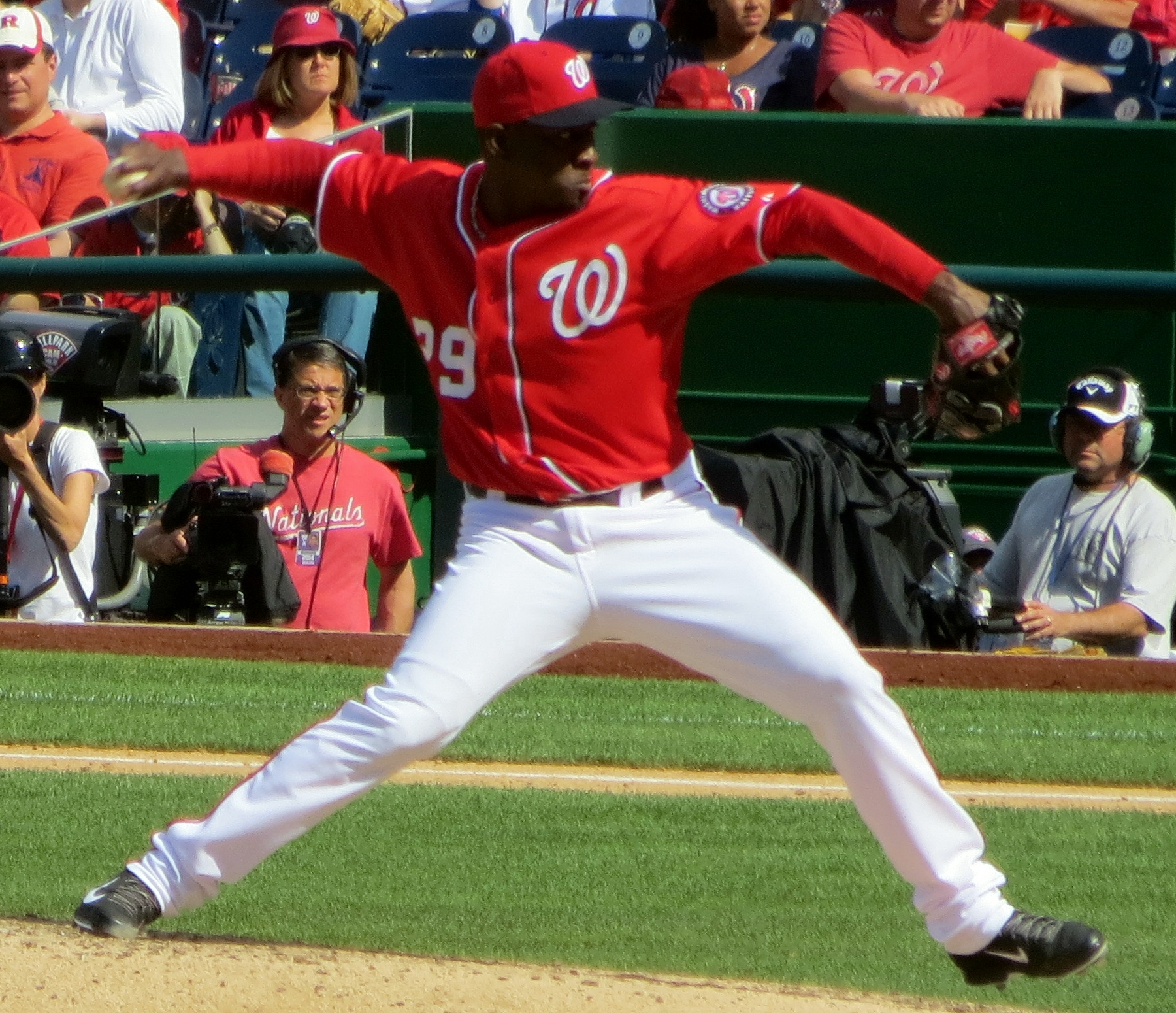 Rafael Soriano